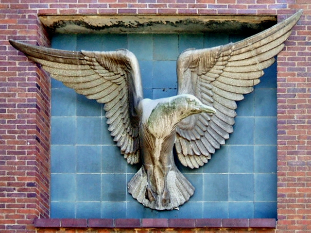 Stralsund. Hanse-Klinikum am Sund, Detail